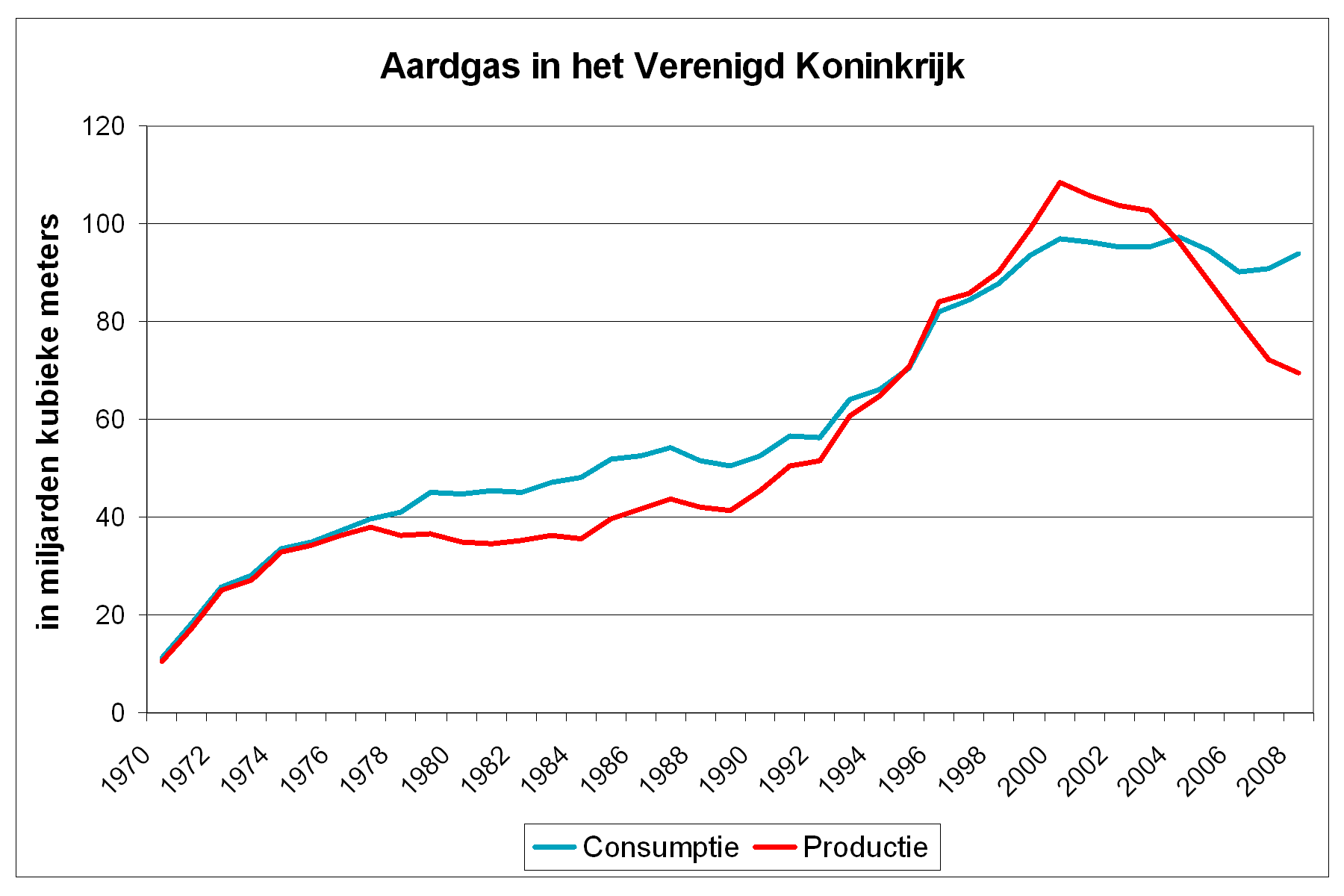 Aardgas productie en consumptie van het Verenigd Koninkrijk. Bron: BP Statistical review of World Energy